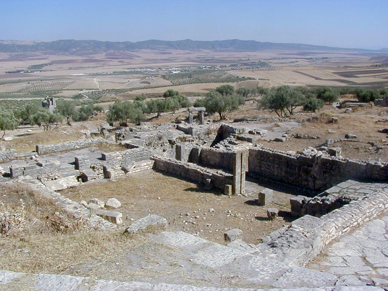 temple présumé de Pluton, Dougga